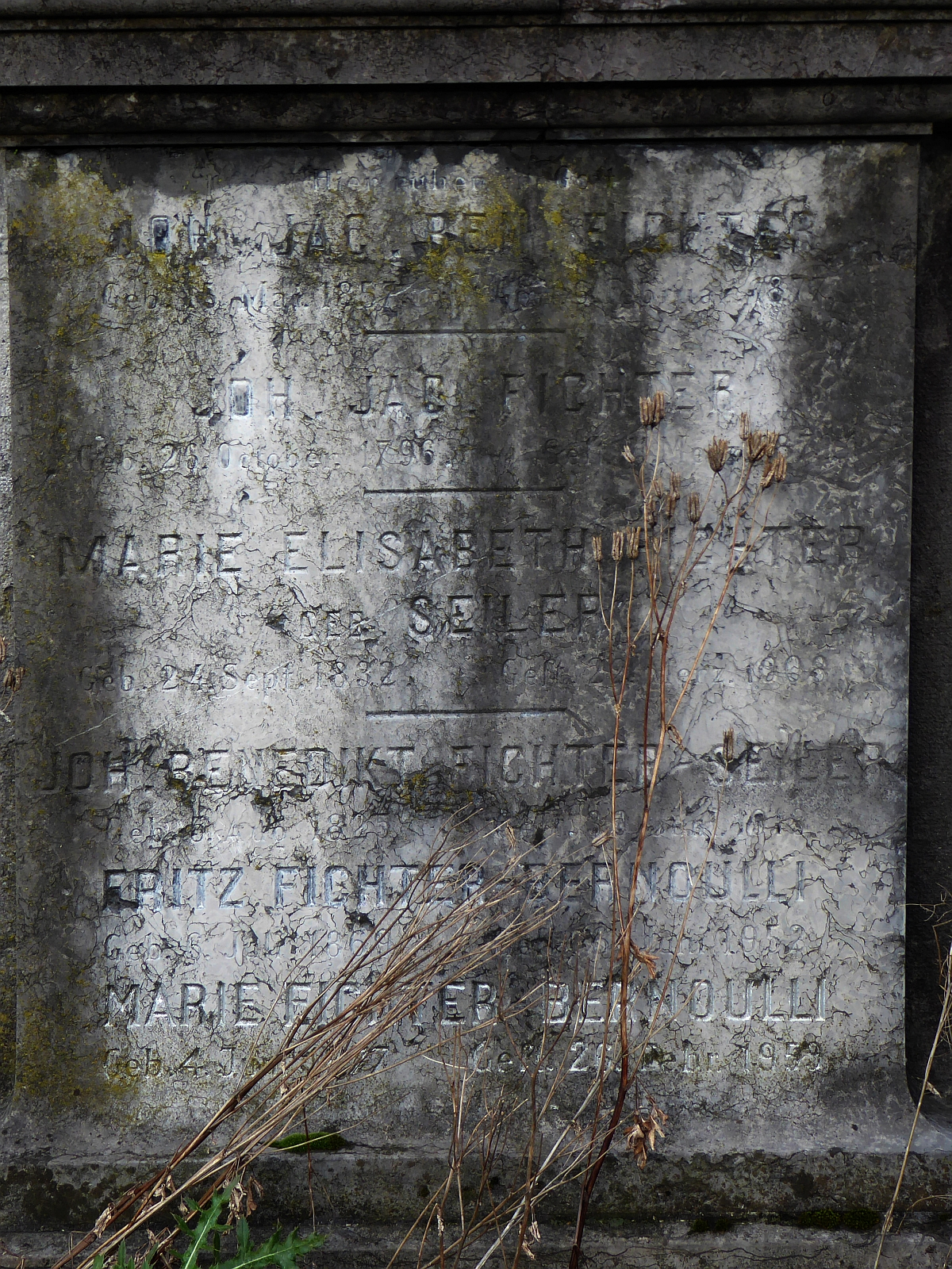 Fritz Fichter-Bernoulli (1869–1952), Chemiker, ordentlichen Professor für anorganische Chemie. Autor «Organische Elektrochemie», Redaktor und Gründer der Helvetica Chimica Acta, Friedhof Wolfgottesacker, Basel